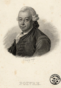 Portrait de Pierre Poivre (1719-1786), horticulteur, botaniste, agronome et administrateur colonial français du XVIIIème siècle. Lithographie par E. Conguy, XIXème siècle.